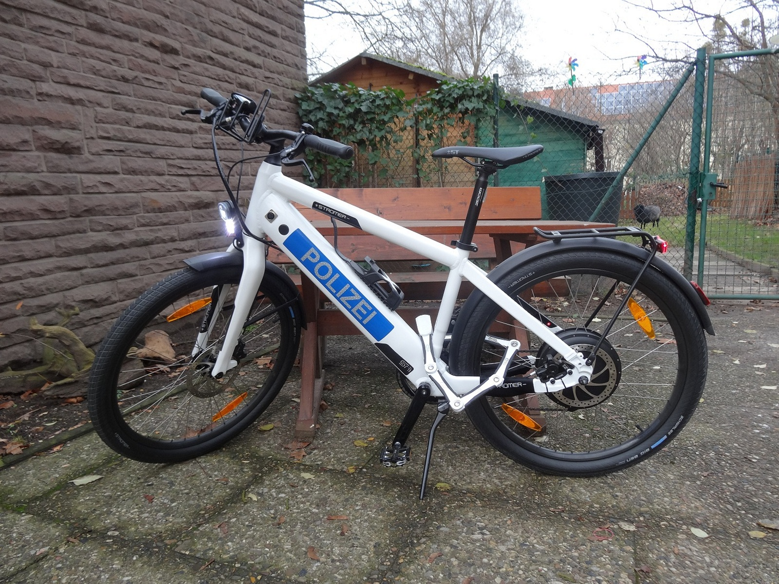 Niedersächsisches Polizeifahrrad